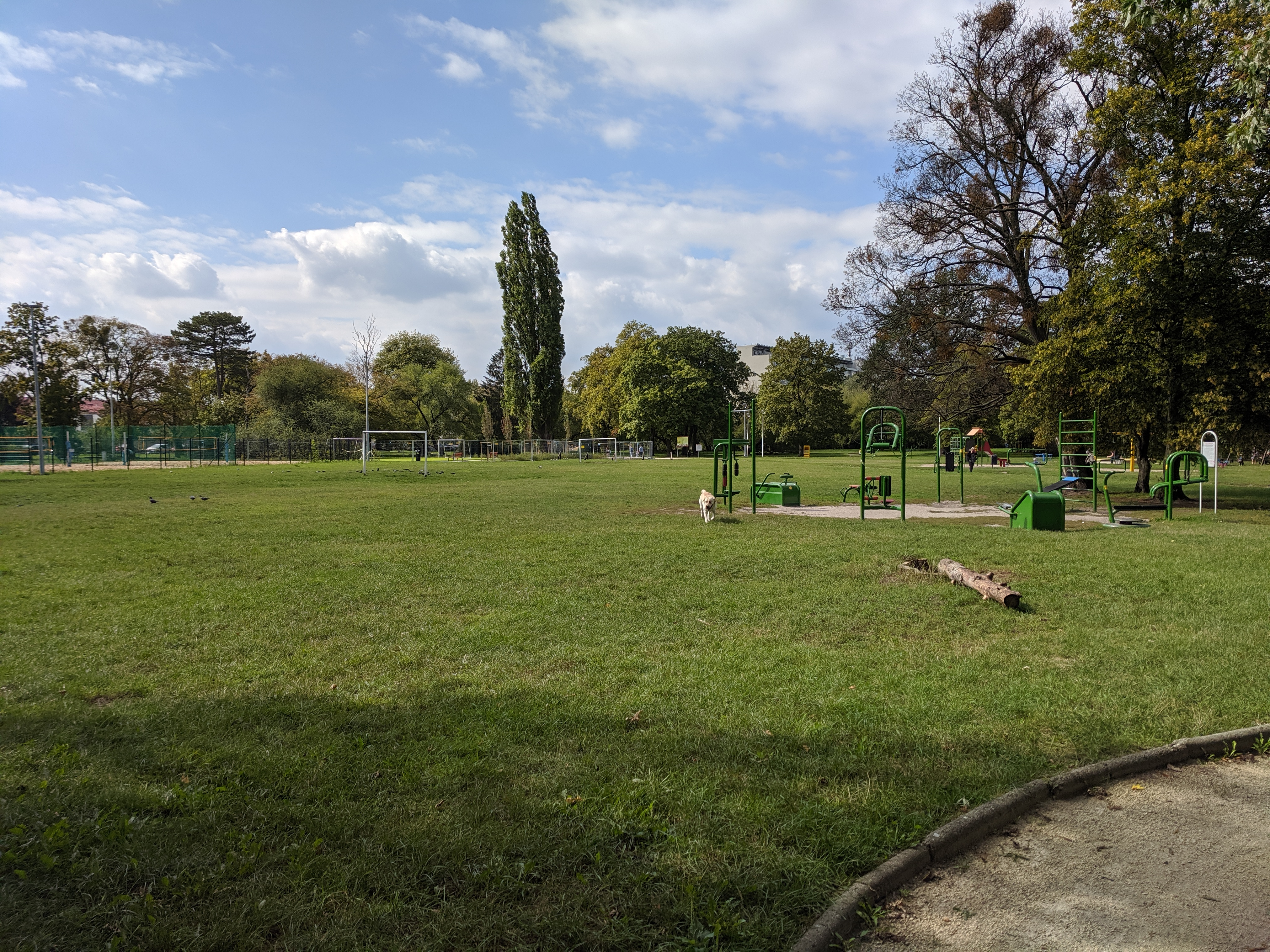 Siłownia na świeżym powietrzu w Parku Skowronim we Wrocławiu